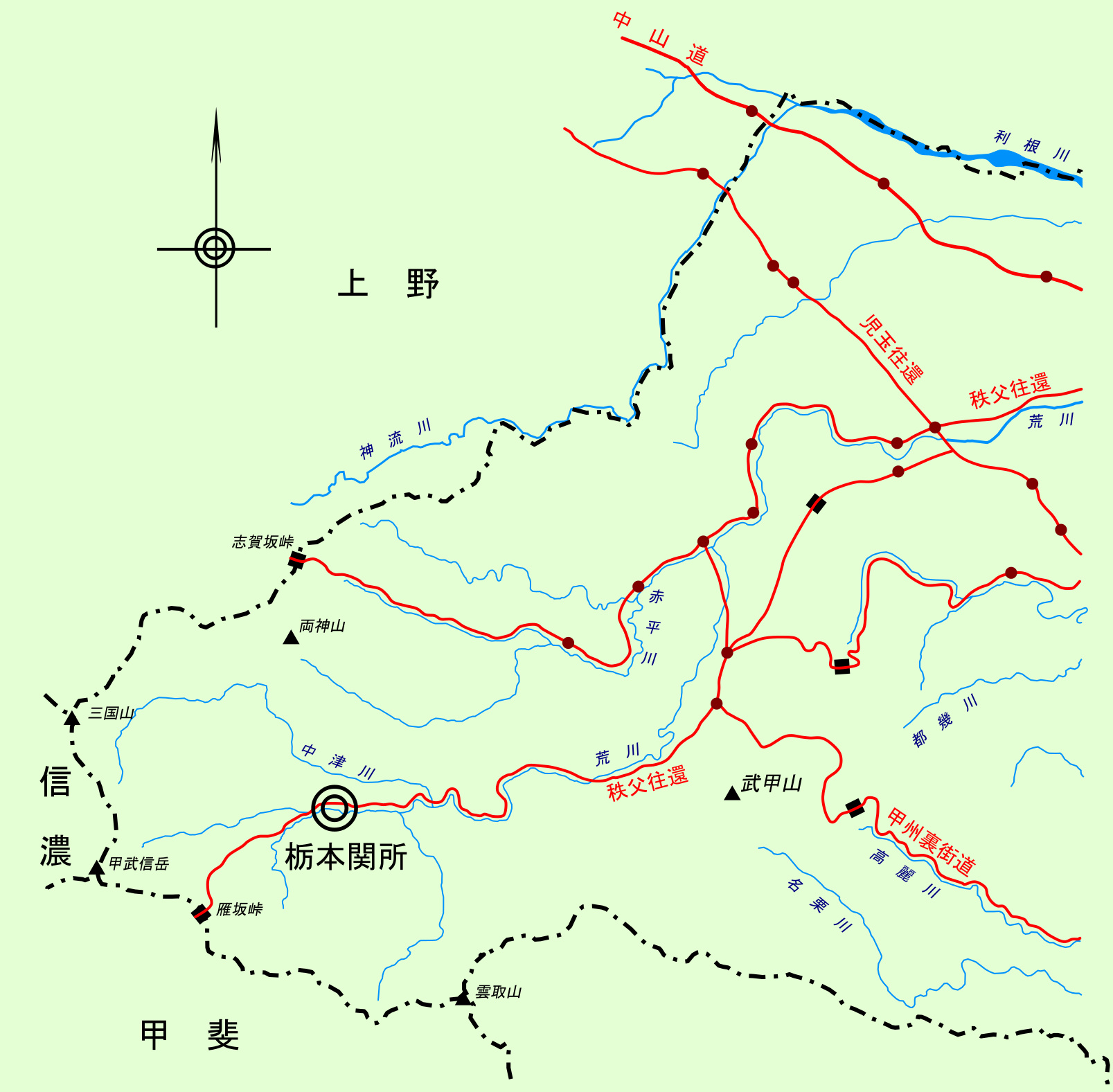 近世（江戸時代）、秩父往還に設置された栃本関所の位置。武蔵国。（角川日本地名大辞典11埼玉 を参考に作成）